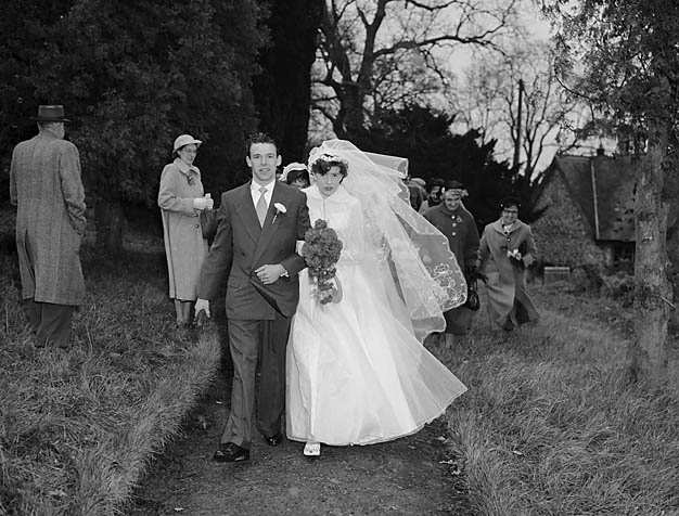 Teitl Cymraeg/Welsh title: Priodas Sylvia Mair Davies a Kenneth Davies ym Mwlch-y-cibau Cyfrwng/Medium: Negydd ffilm / Film negative Cyfeiriad/Reference: (gch07328) Rhif cofnod / Record no.: 3368098 Rhagor o wybodaeth am gasgliad Geoff Charles yn Llyfrgell Genedlaethol Cymru More information about the Geoff Charles Collection at the National Library of Wales Mae ffotograffau Geoff Charles hefyd yn rhan o Broject Europeana Libraries Geoff Charles' photographs also form part of the Europeana Libraries Project